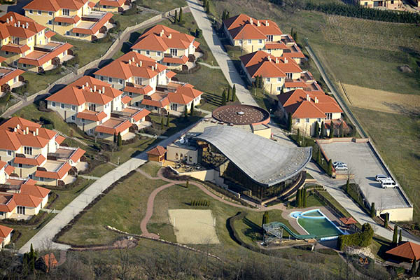 Holland üdülőfalu, Dunaszentmiklós